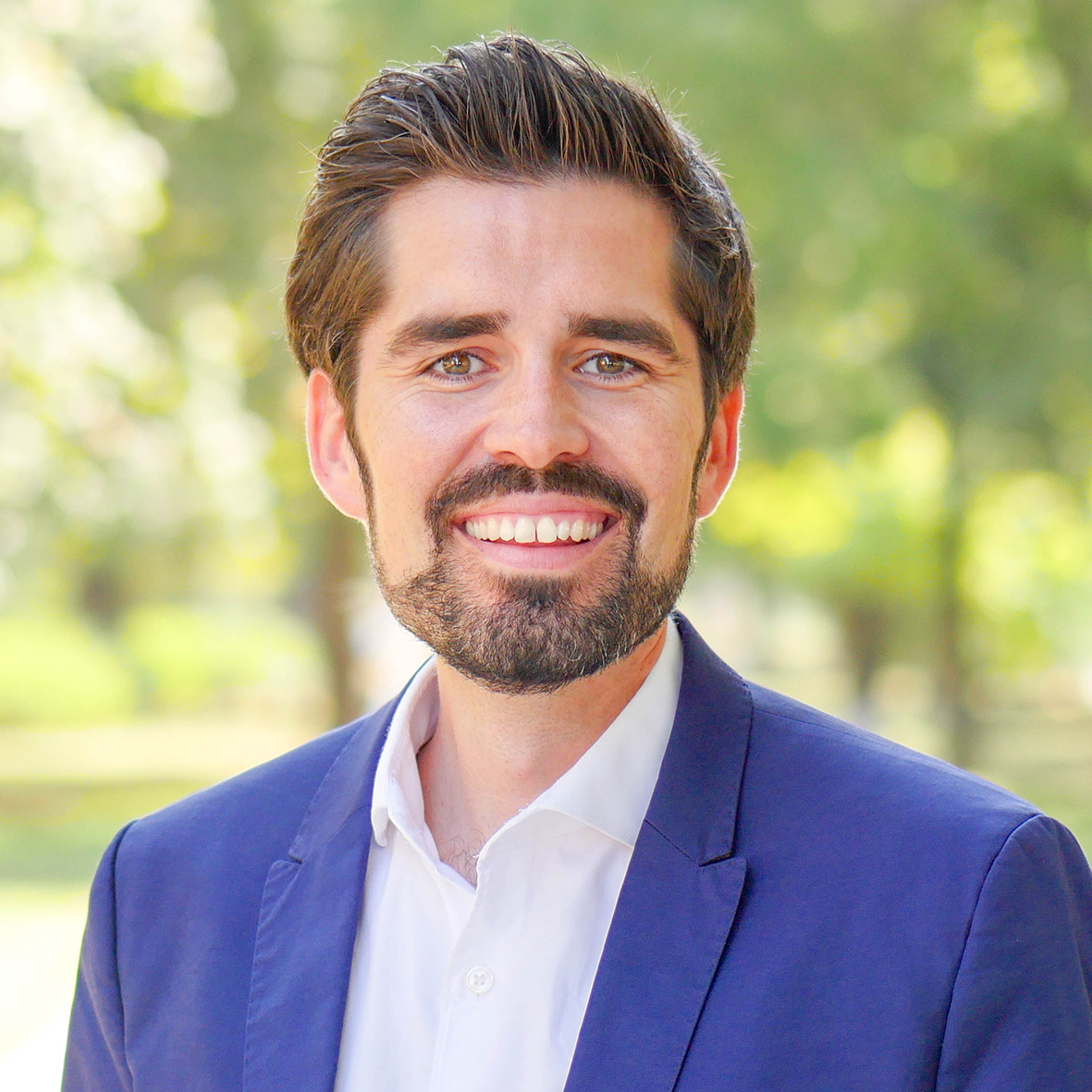 Der Trierer Landtagsabgeordnete Sven Teuber